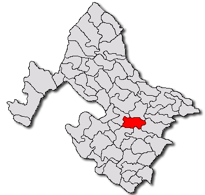 Categorie:Hărţi ale judeţului Mehedinţi